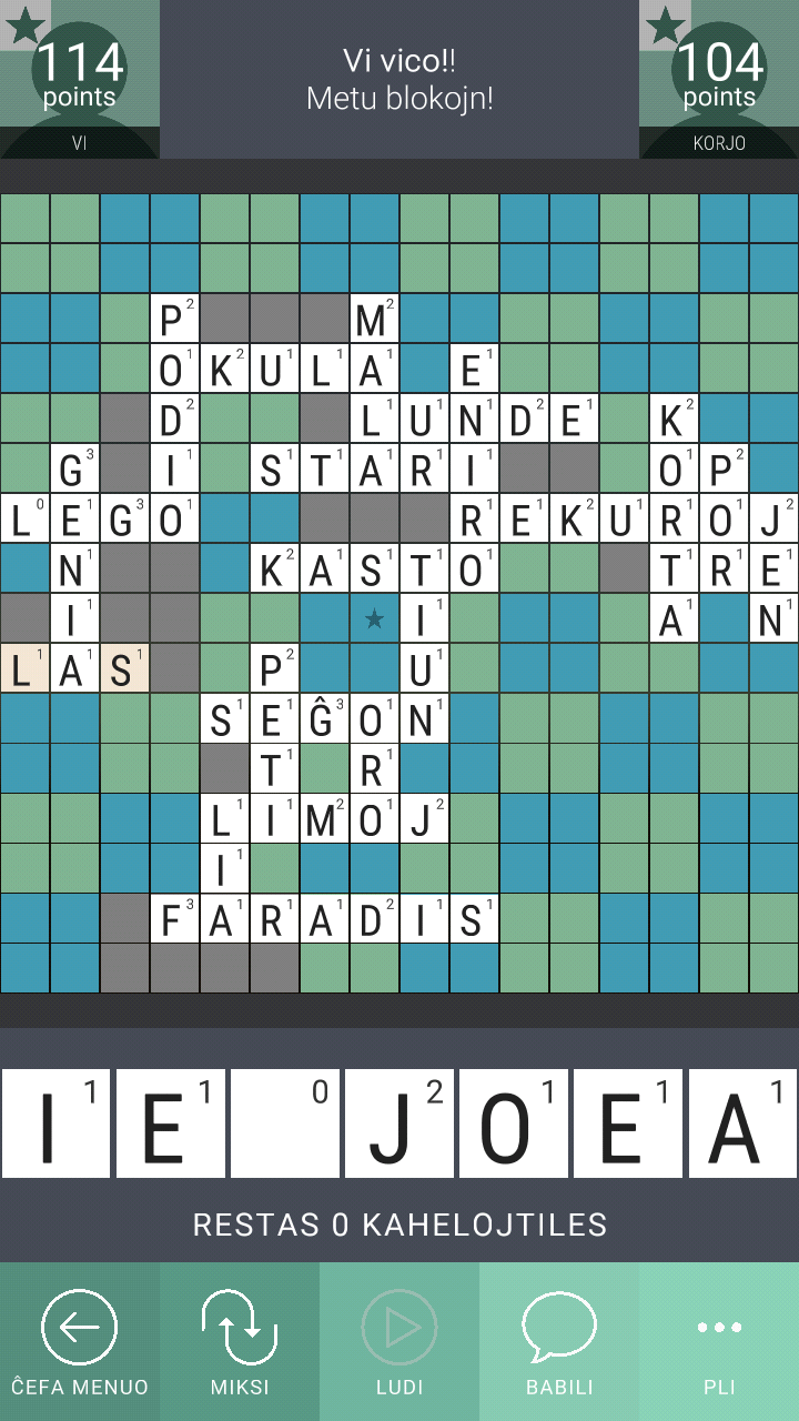 ekrankopio de la saĝtelefona ludo "vortludo"